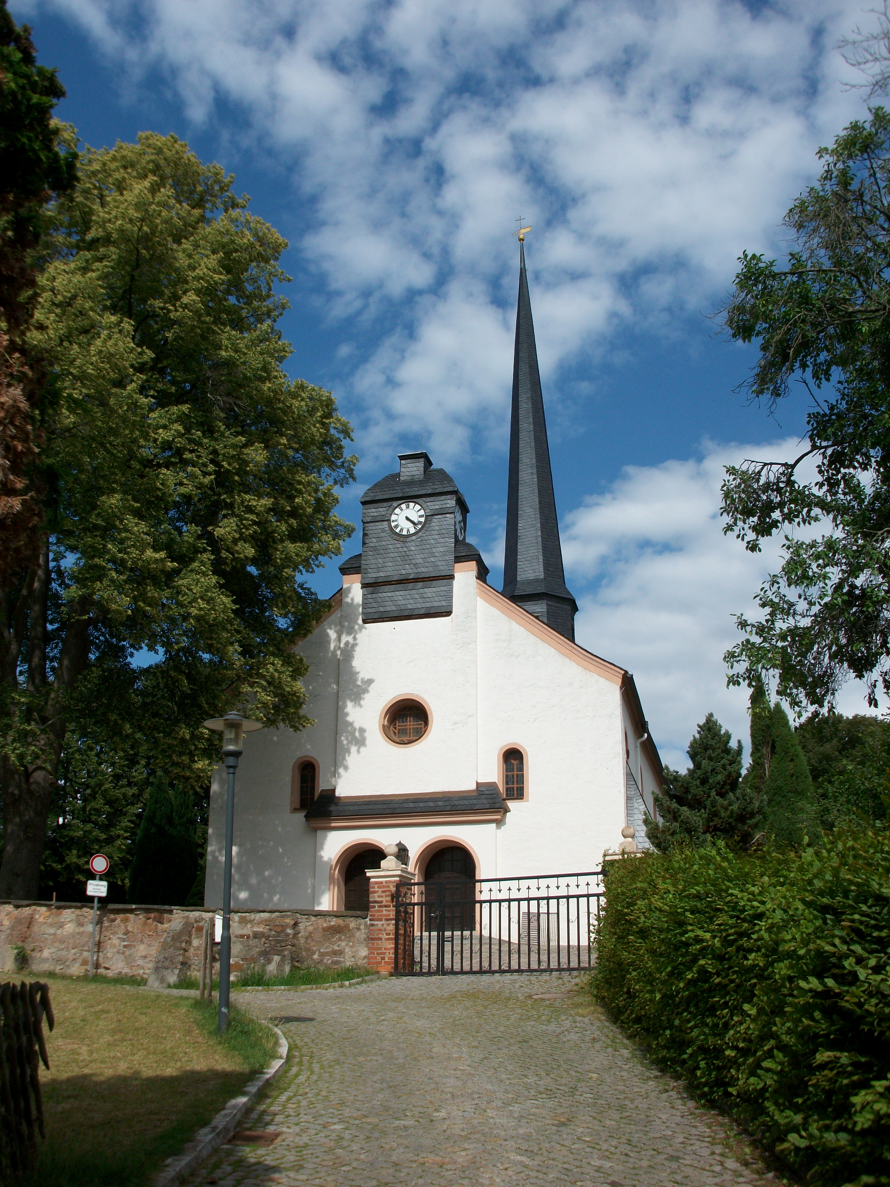 Kirche Bernsdorf (Landreis Zwickau)